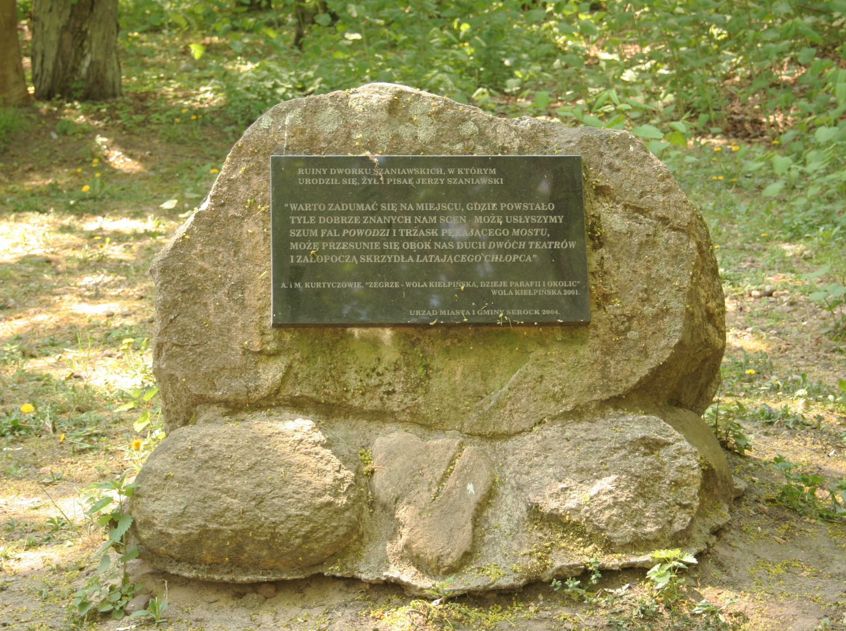 Tablica pamiątkowa dworku Szaniawskich, gdzie tworzył Jerzy Szaniawski